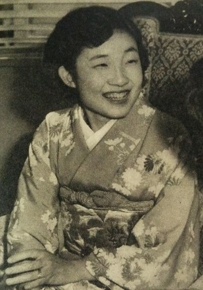 池田厚子